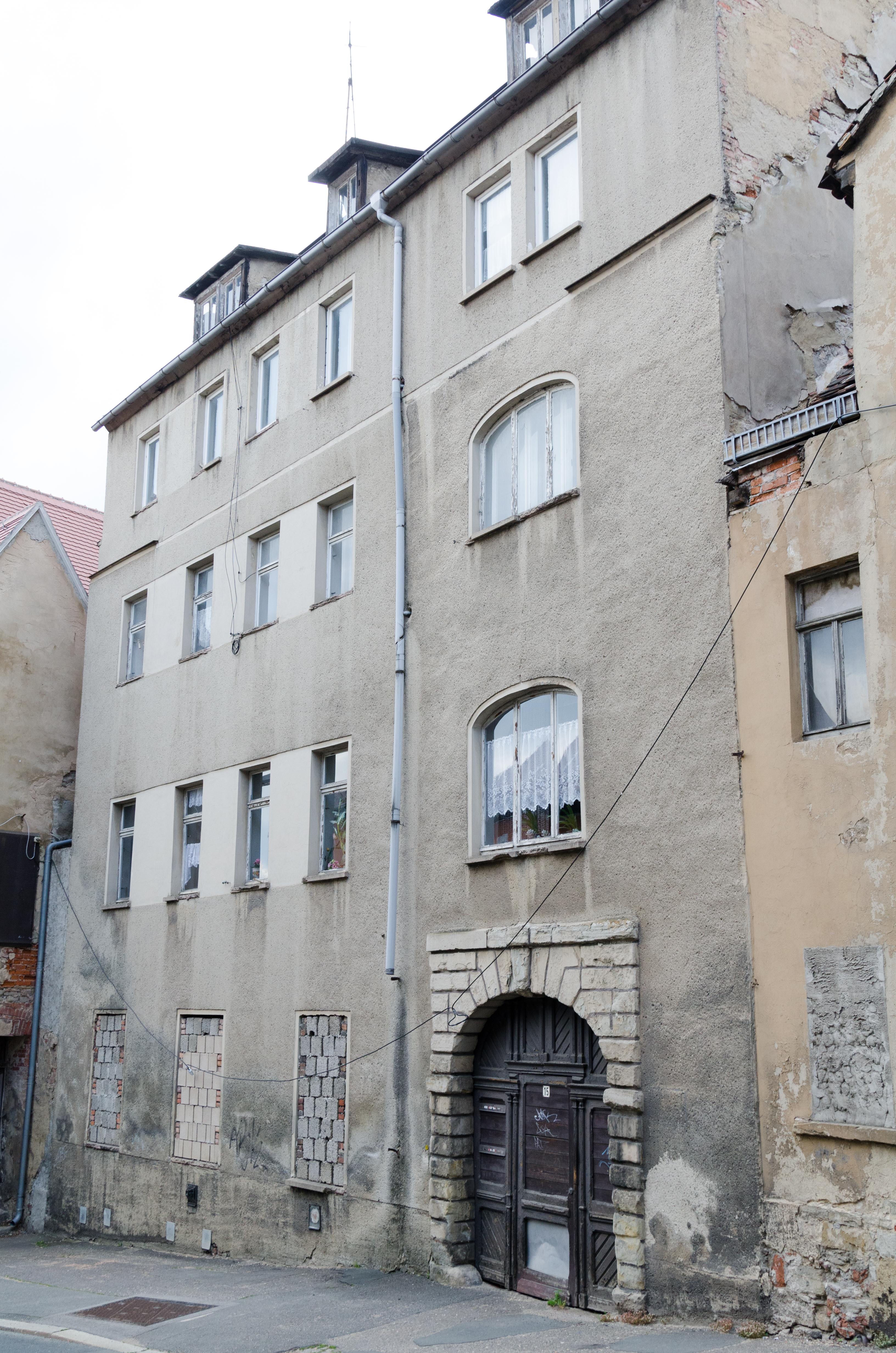 Zeitz, Rahnestraße 15